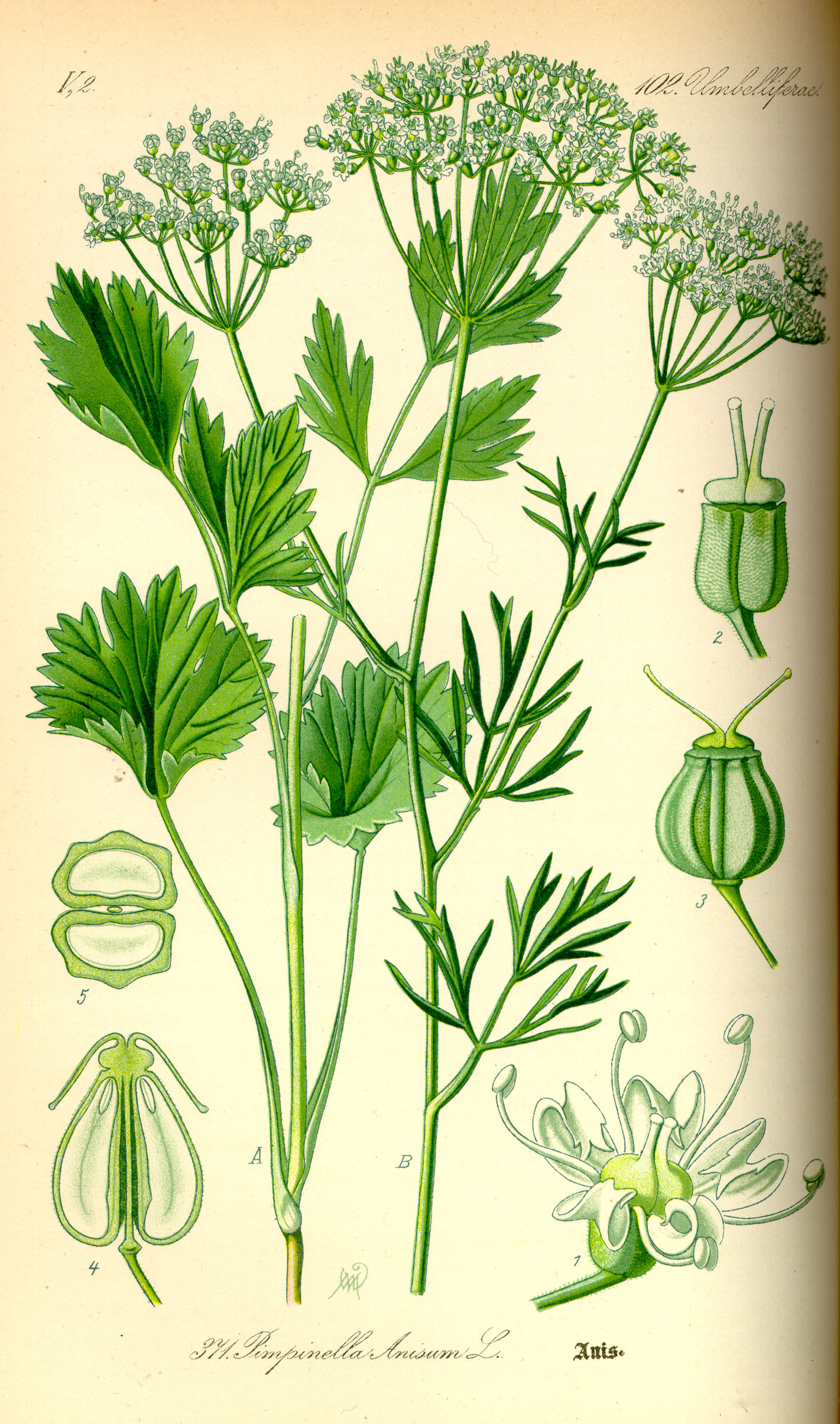 Name Pimpinella anisum Family Apiaceae